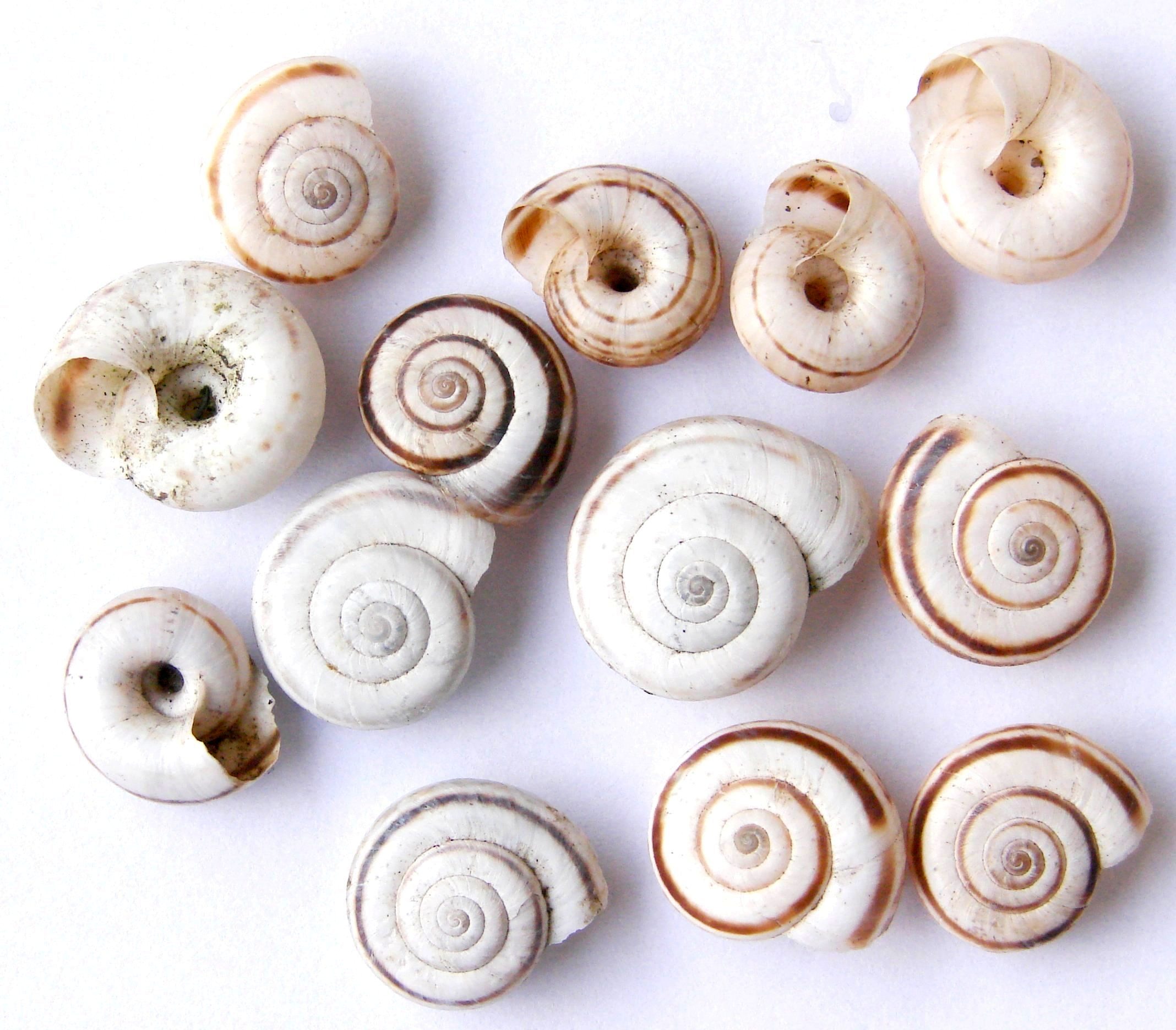 Xerolenta obvia